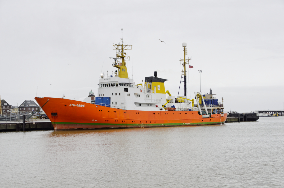 Schiffe in Cuxhaven Aquarius (alt Meerkatze)